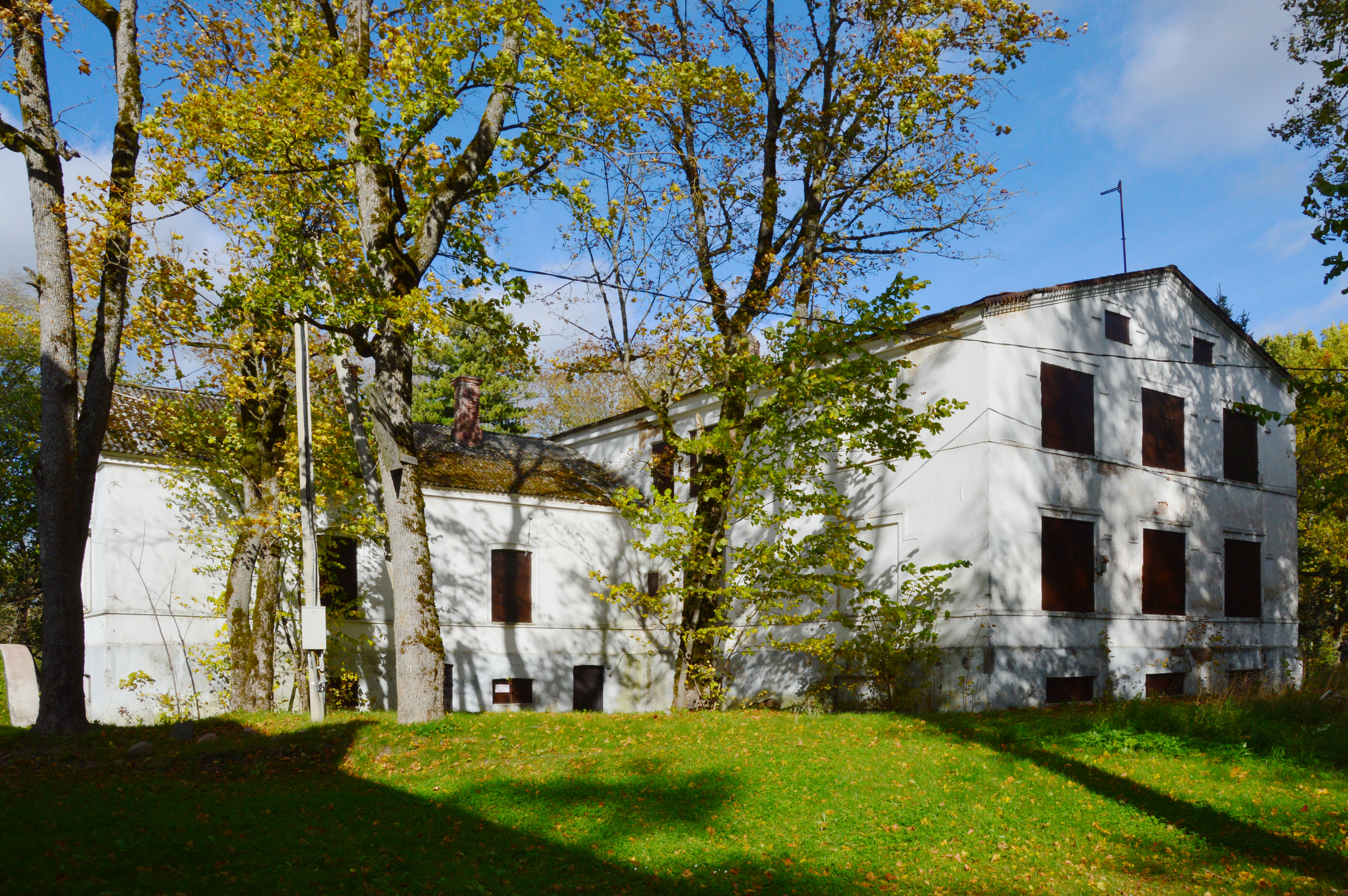 Kurtna mõisa peahoone